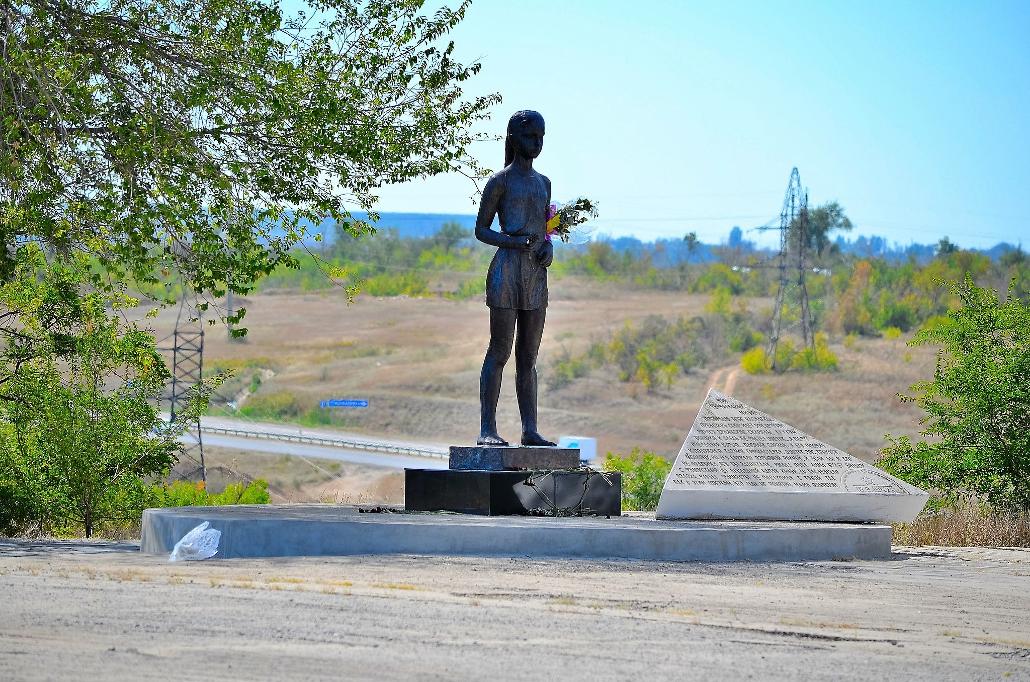 Солдатское поле — мемориальный комплекс, павшим воинам 62-й армии Расположен в Городищенском районе Волгоградской области